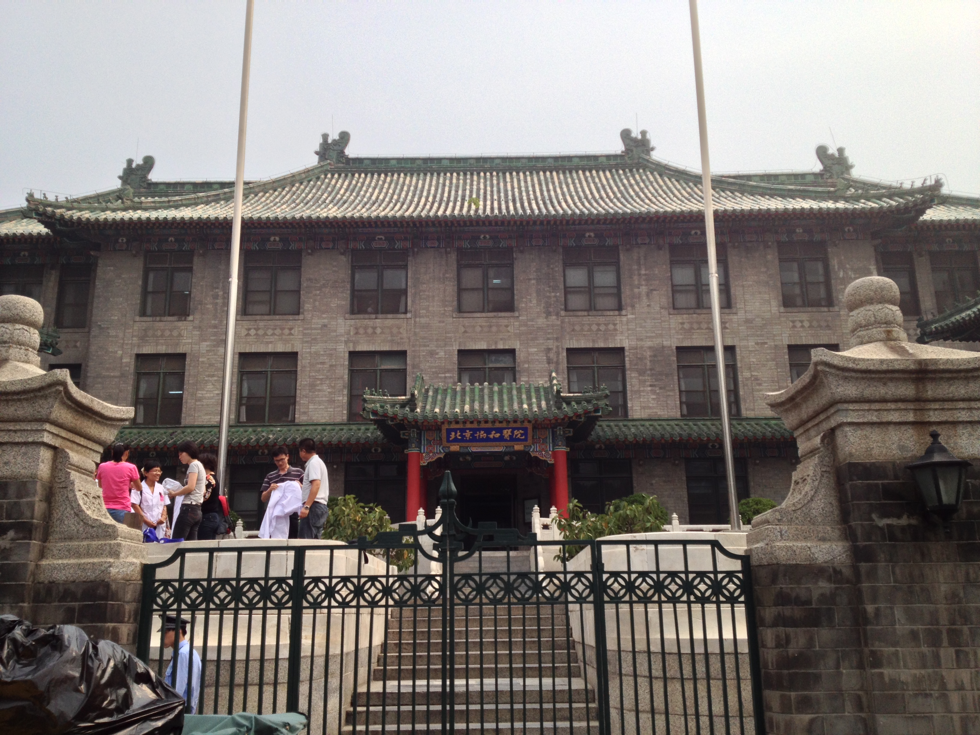 中文（中国大陆）: 原协和医学院，现北京协和医院（暨北京协和医学院）之——老楼，正门